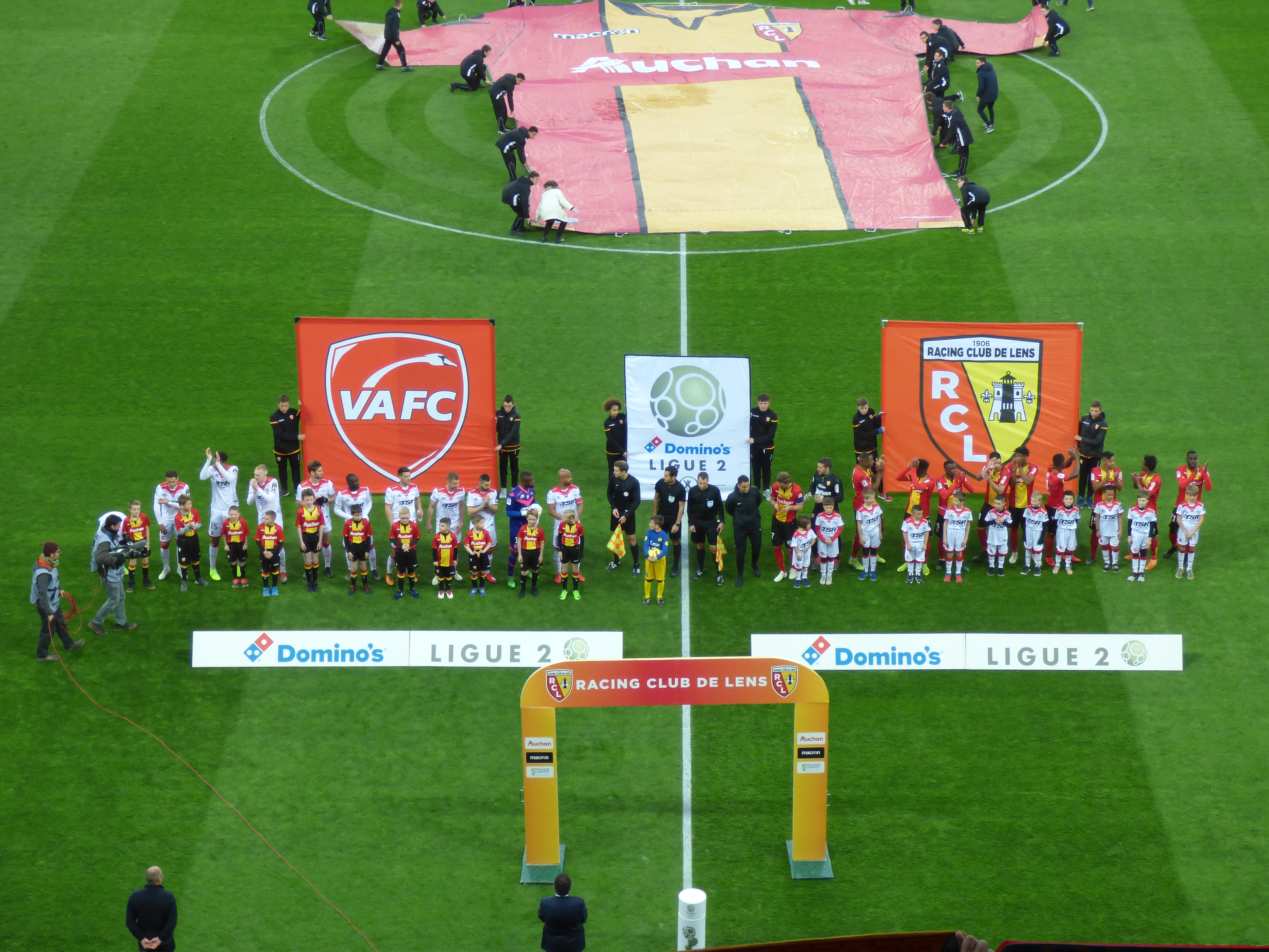 Match Lens-Valenciennes, comptant pour la 32ème journée du championnat de France de football de Ligue 2 2018-2019, le 12 avril 2019, au Stade Bollaert-Delelis.